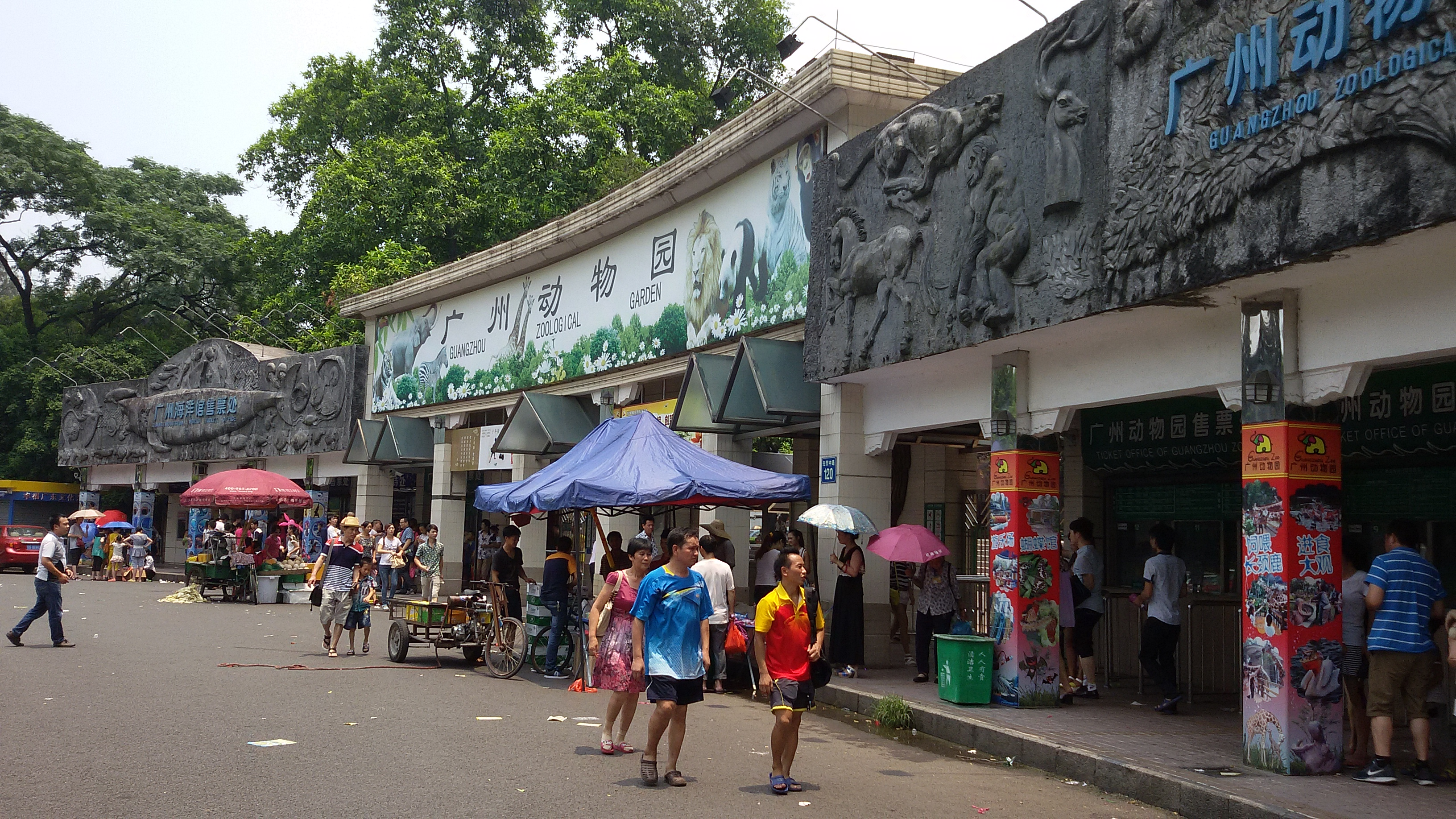 粵語: 广州动物园嘅北门